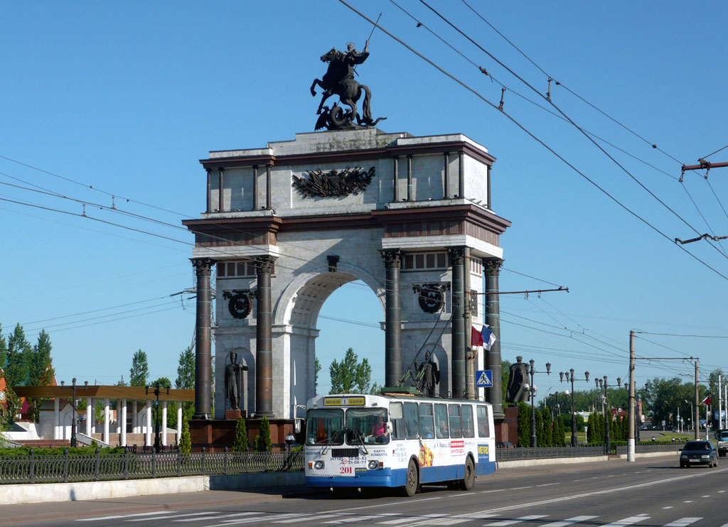 Троллейбус ЗиУ682Г в Курске